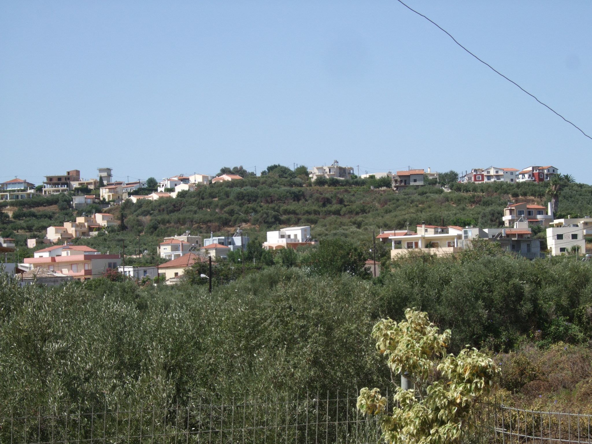 Tavronitis na Krecie.